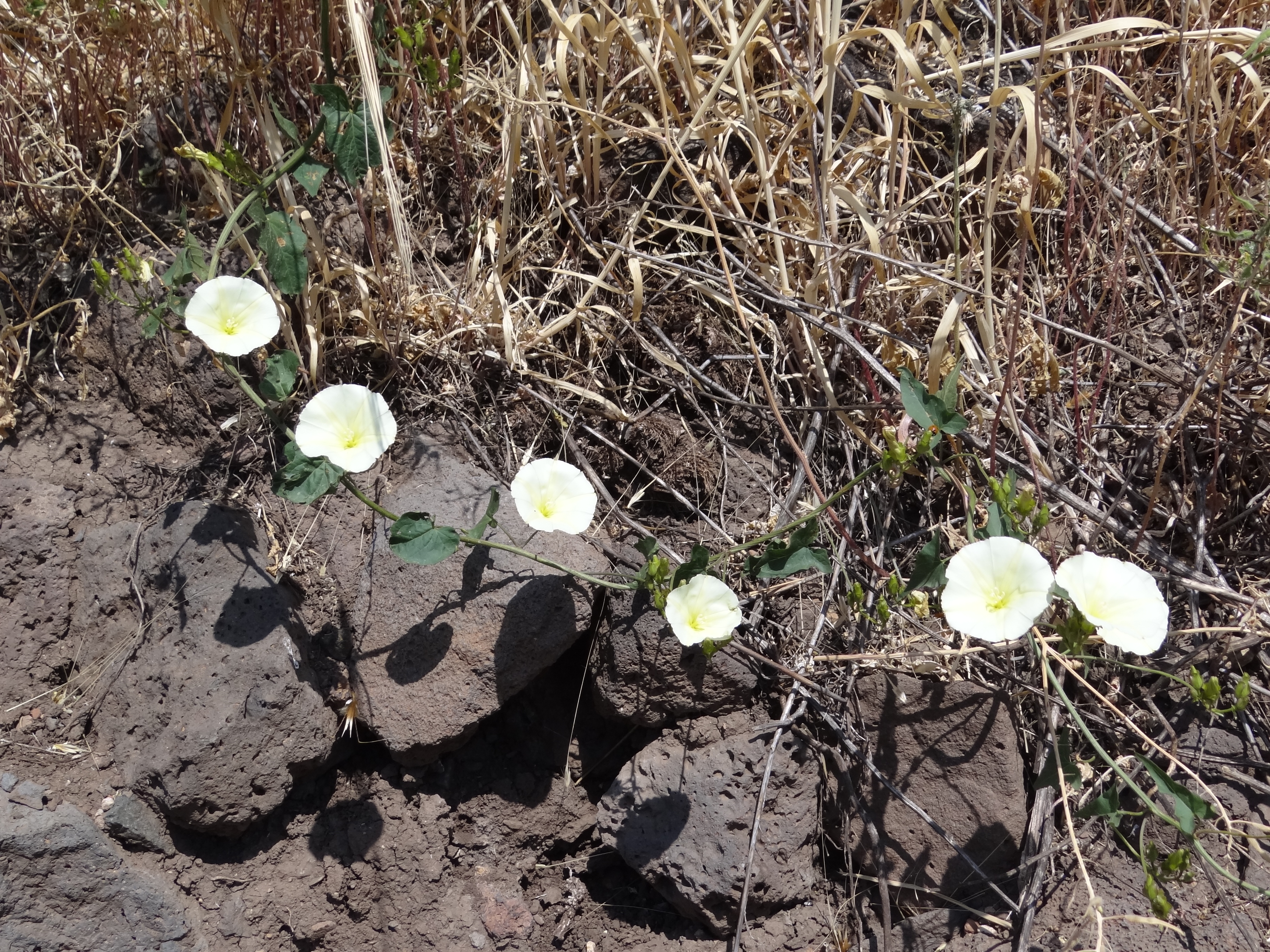 Gamla Nature reserv in Golan Heights גמלא היא שמורת טבע ואתר ארכאולוגי במרכז רמת הגולן, כ-20 קילומטרים דרומית לקצרין. Calystegia sepium Greater Bindweed חבלבלן המשוכות